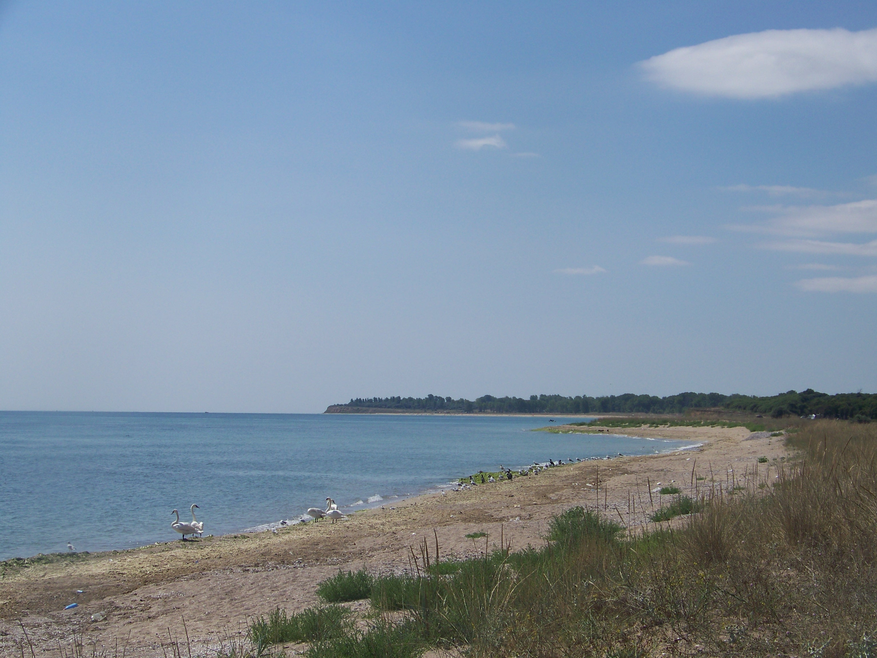 Paysage sauvage à Shabla en Bulgarie, au bord de la mer noire, près de la frontière avec la Roumanie.